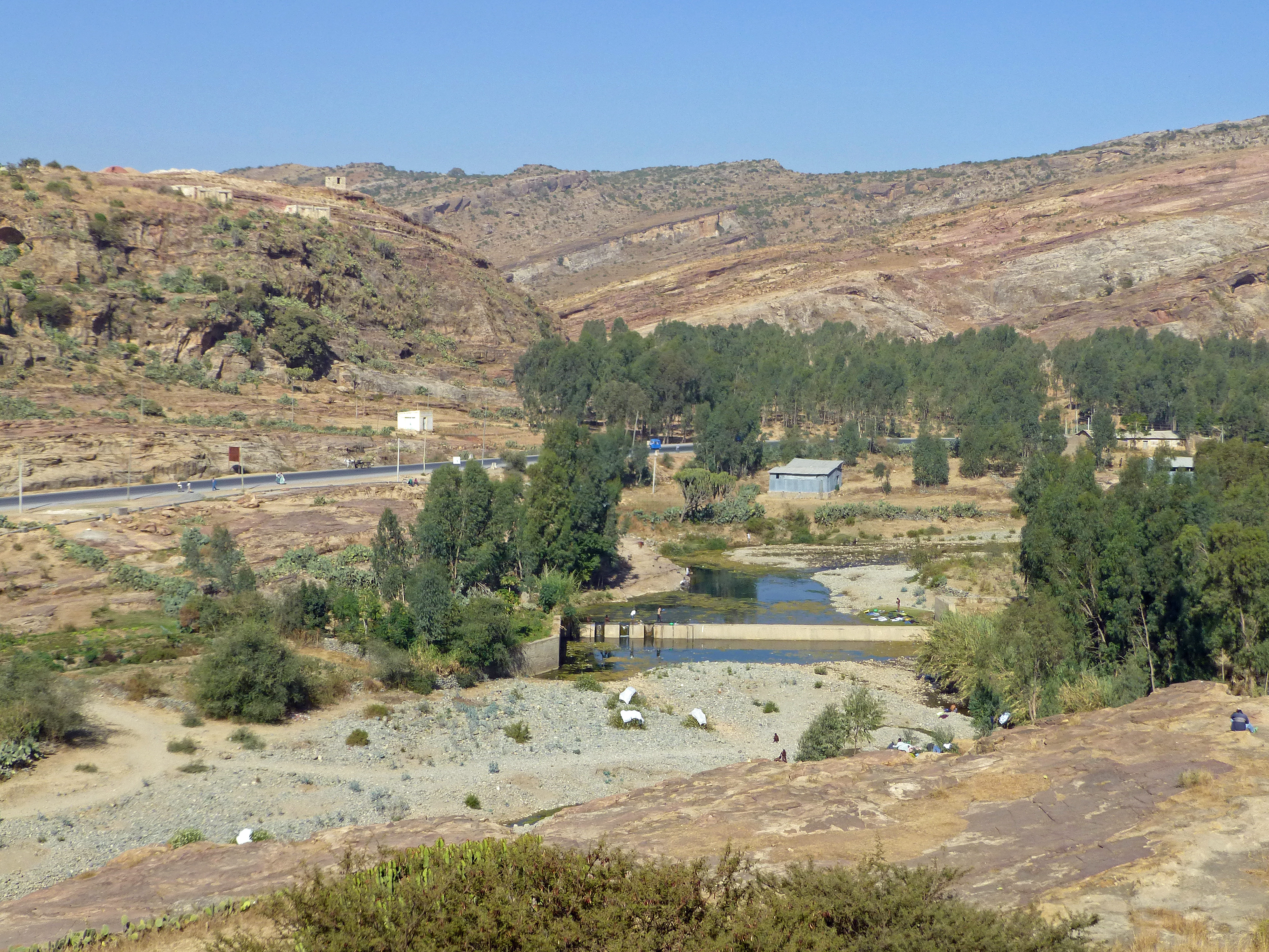 Wukro (région Tigray, Ethiopie) : vue depuis l'église